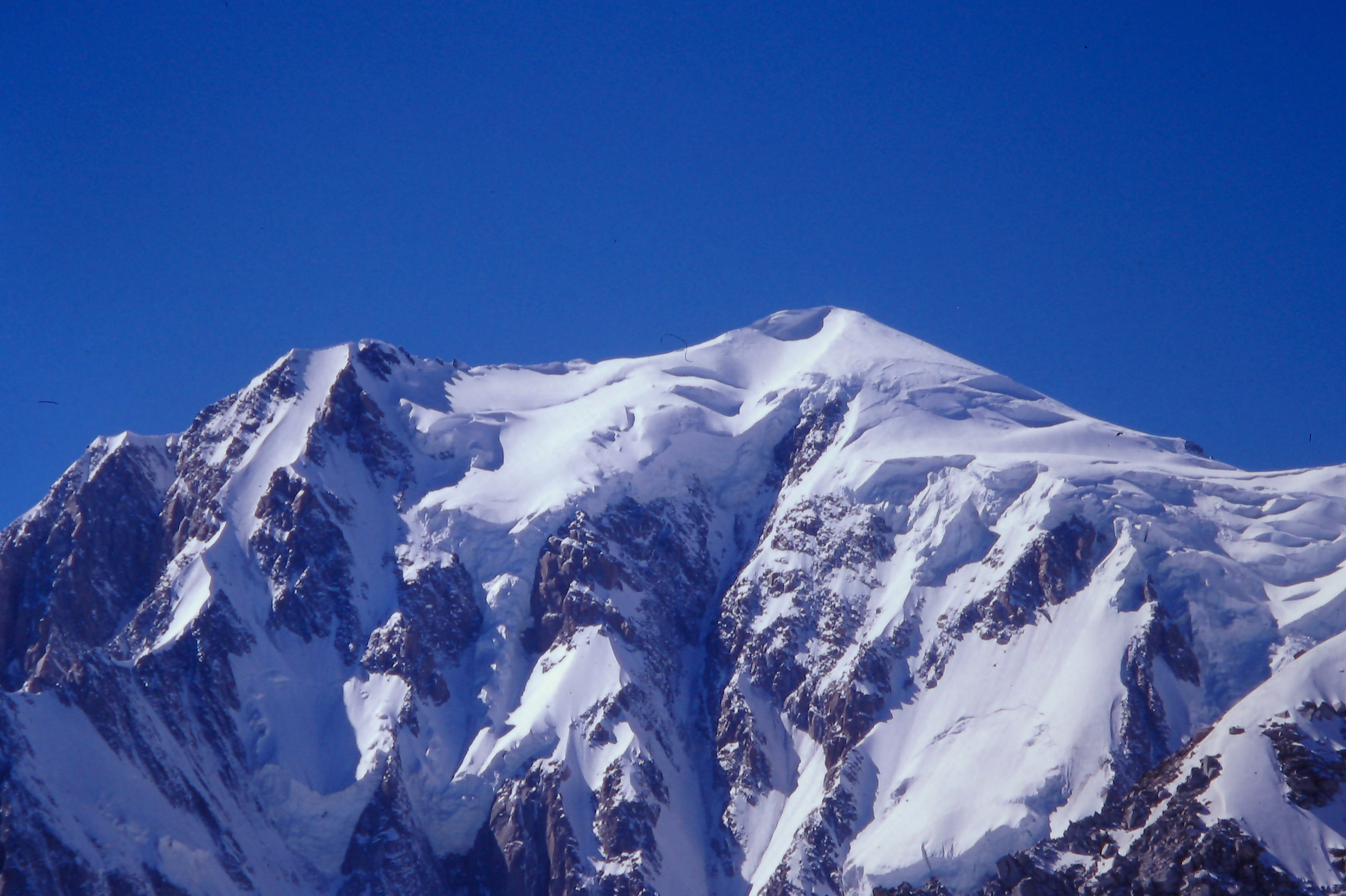 Monte Bianco di Courmayeur This is a photo of a monument which is part of cultural heritage of Italy.